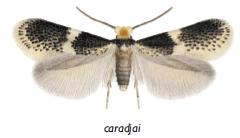 Ectoedemia caradjai male